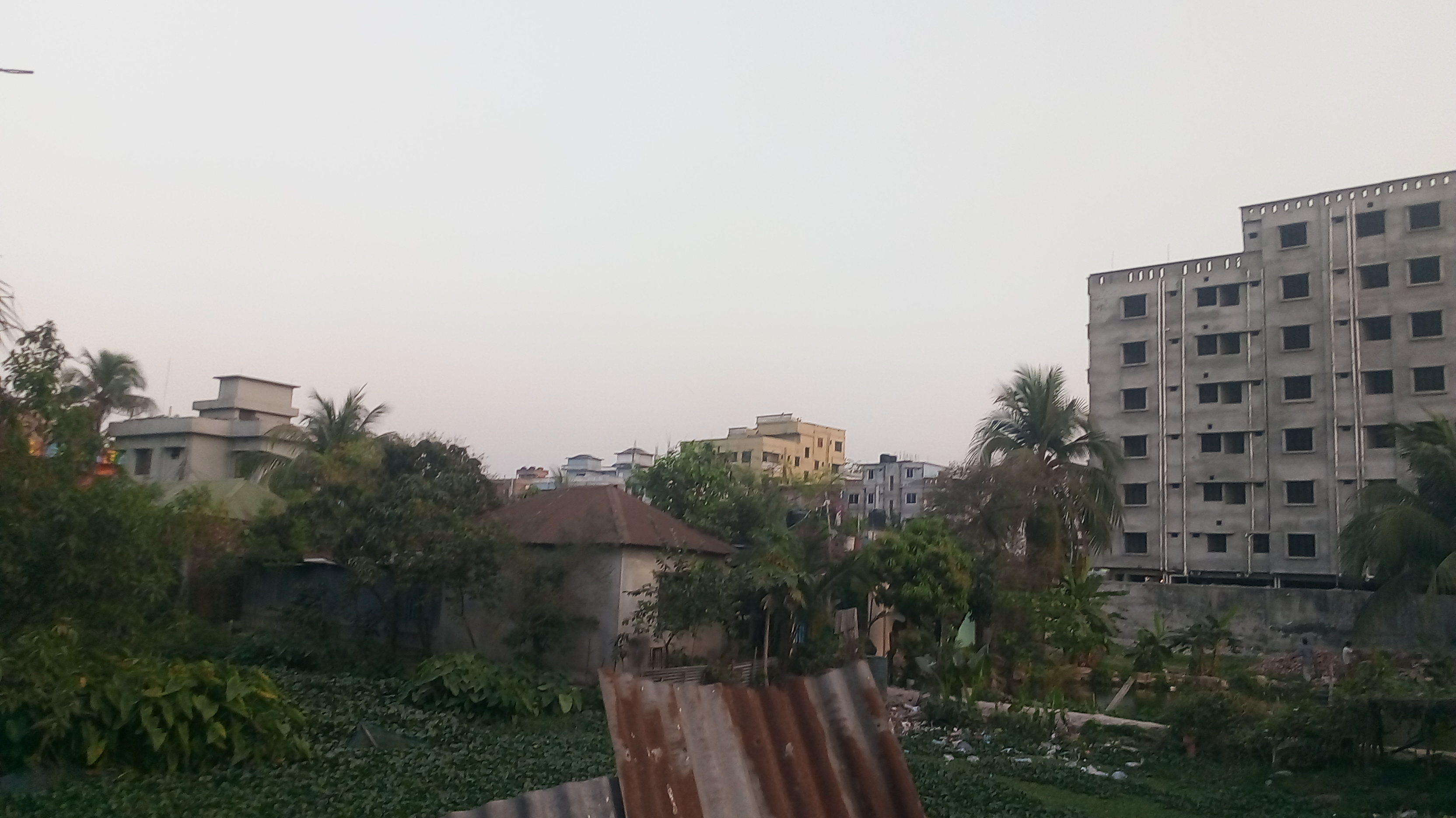 Gazipur16noward.jpg